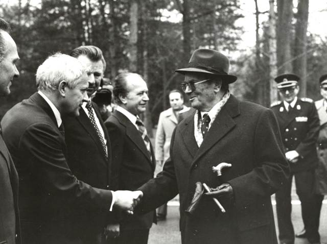 Prijem delegacije JNA kod predsednika Tita, povodom Dana Armije, Karađorđevo, 21.12.1979. Inventarski broj:1979 707 066